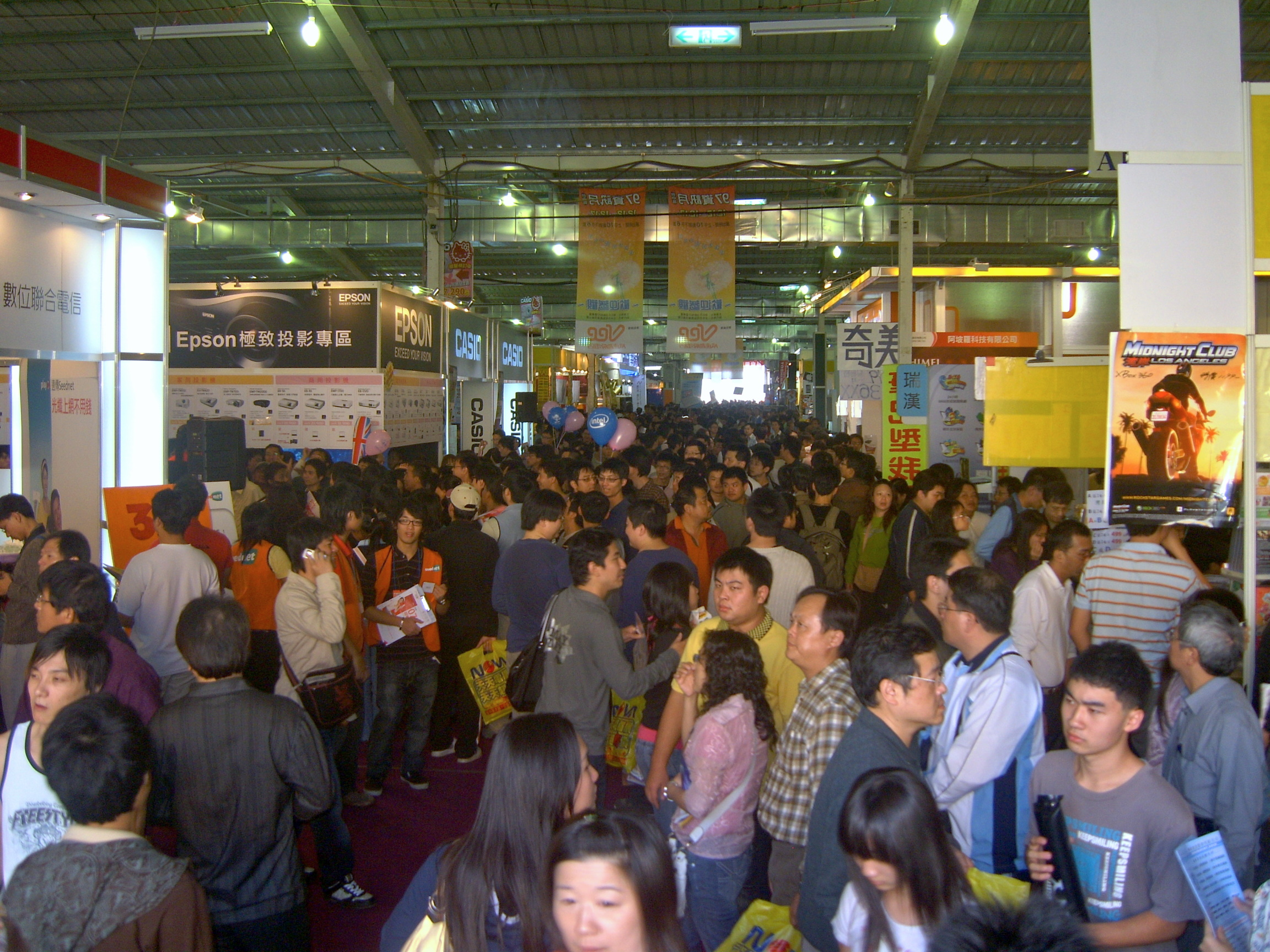 2008 Taichung IT Month.